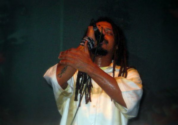 Foto show de O Rappa no Tom Brasil